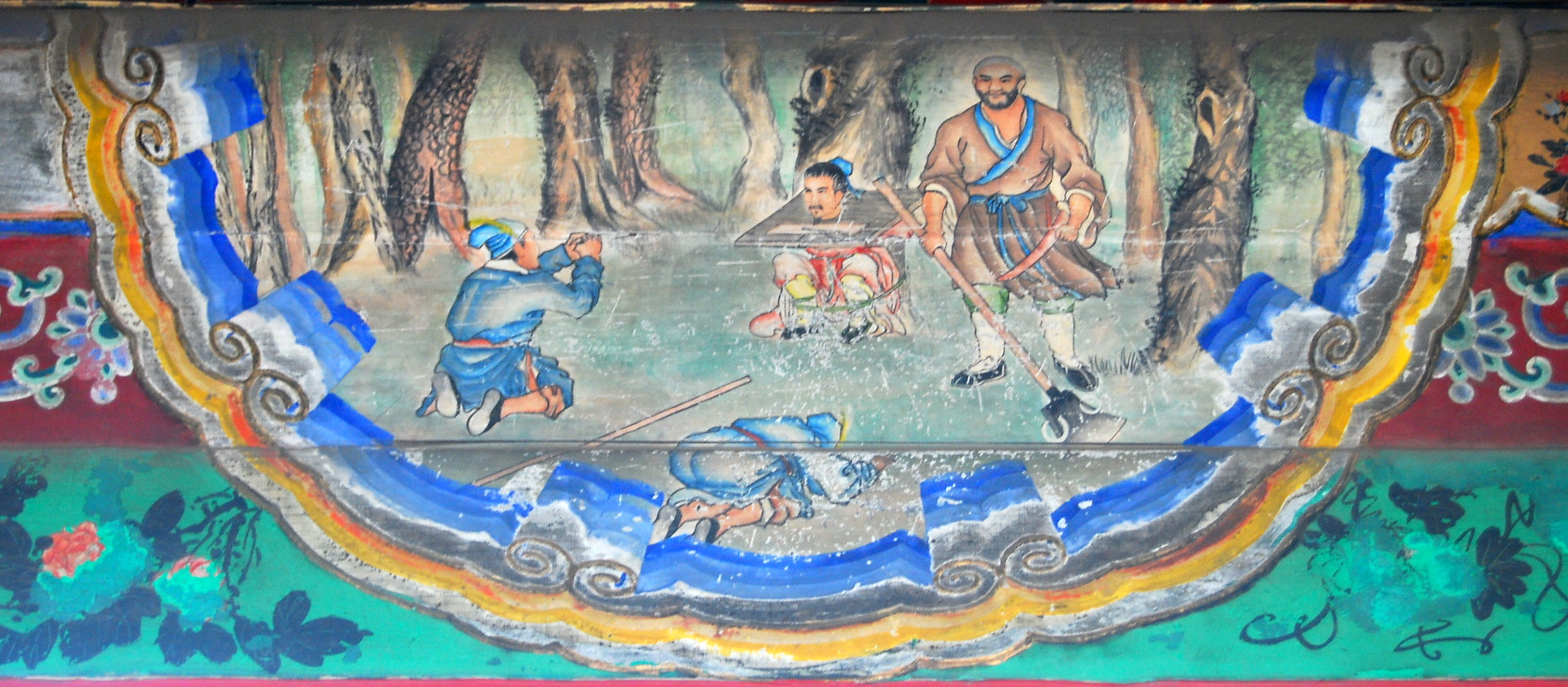 颐和园长廊上的彩绘：野猪林